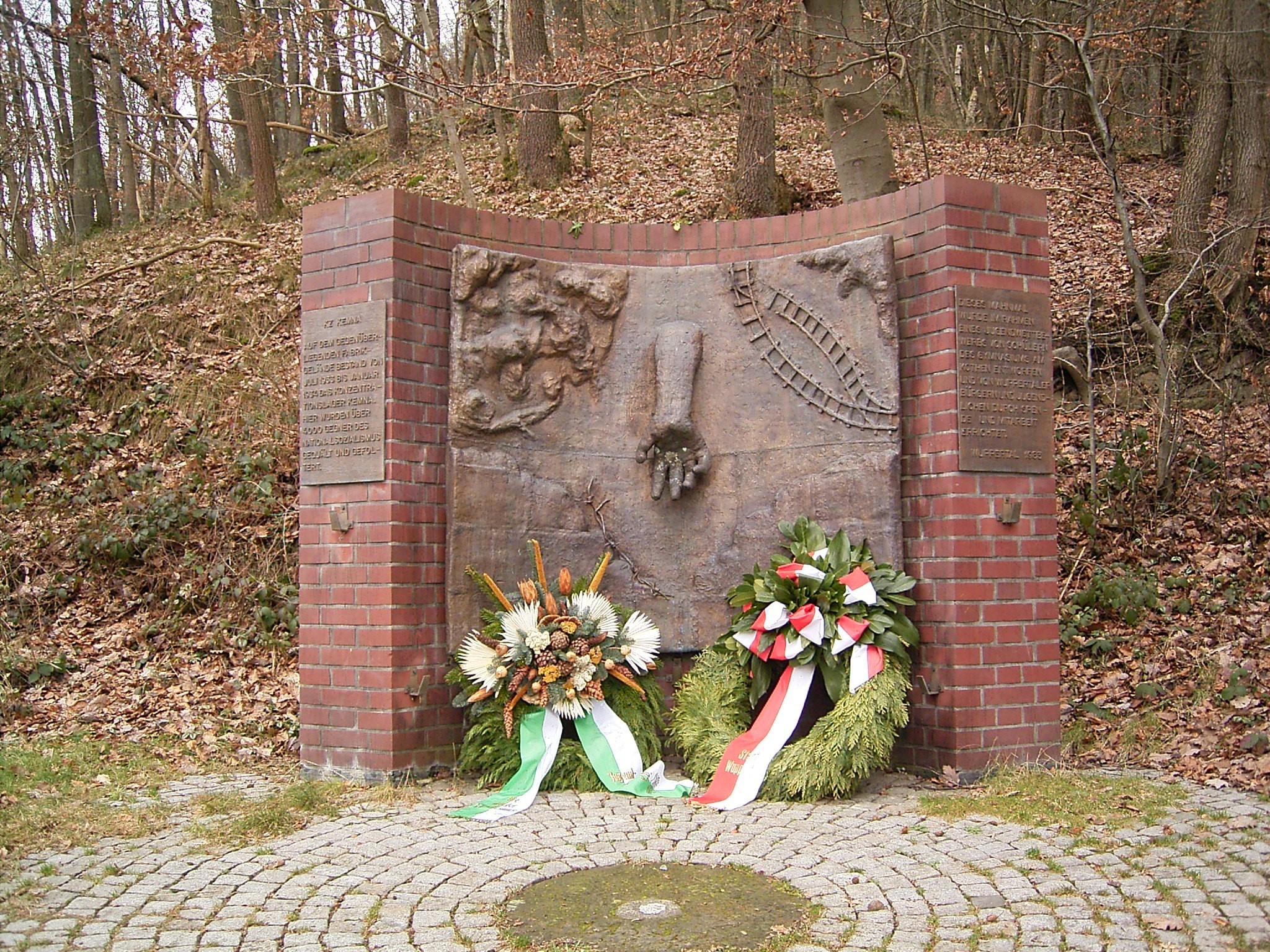 Mahnmal KZ Kemna in Wuppertal